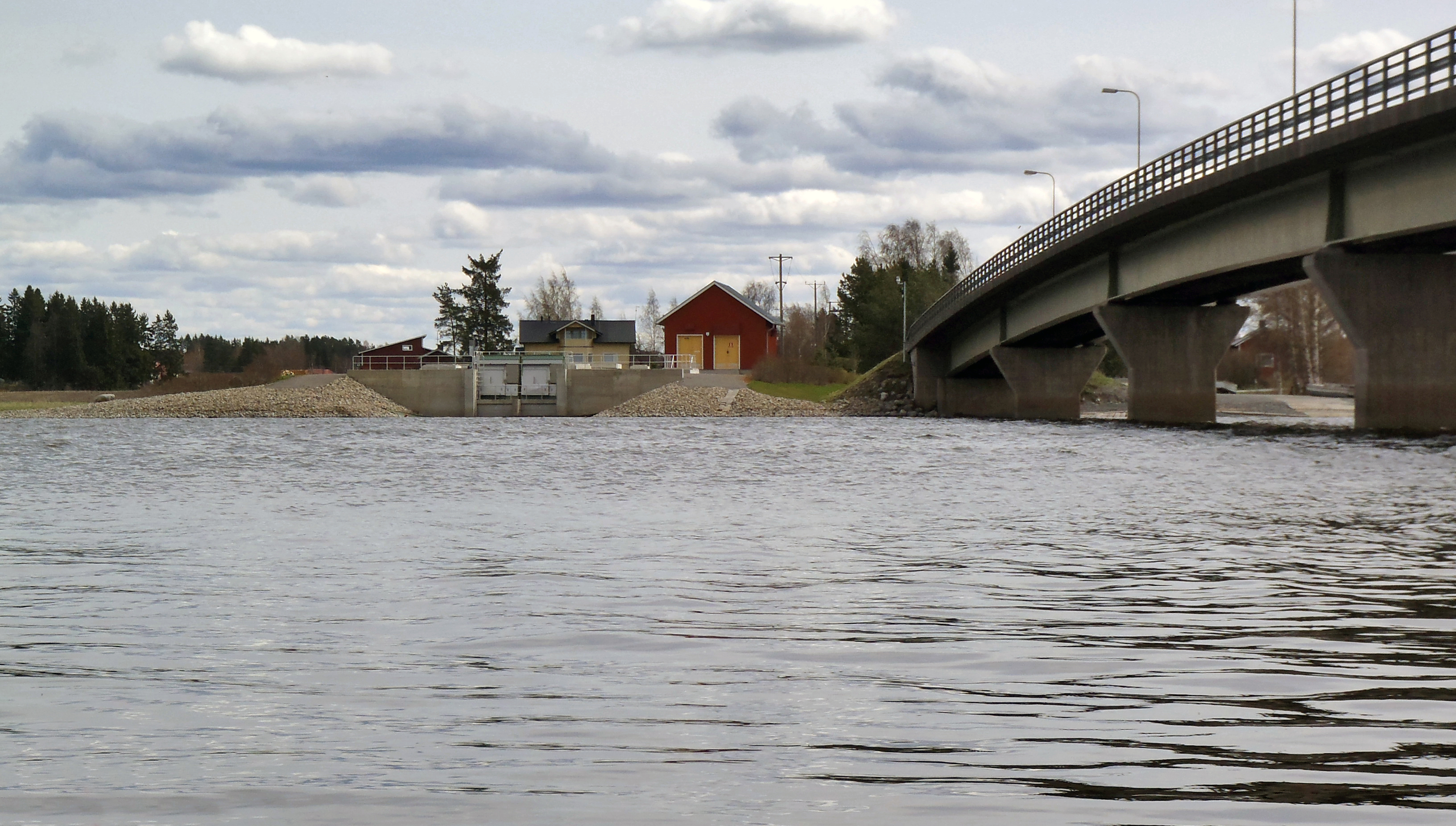 Turunseudun veden vedenottamo Huittisissa